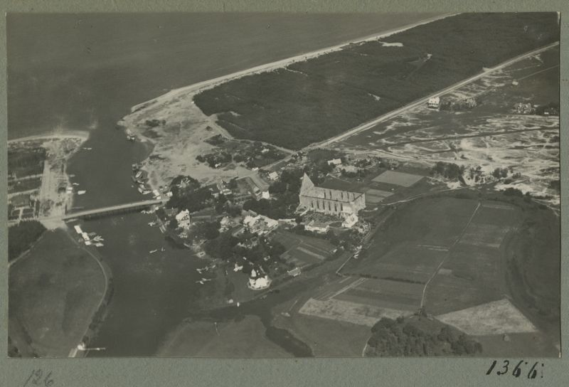 Lennuvaade: Piritale jõesuu